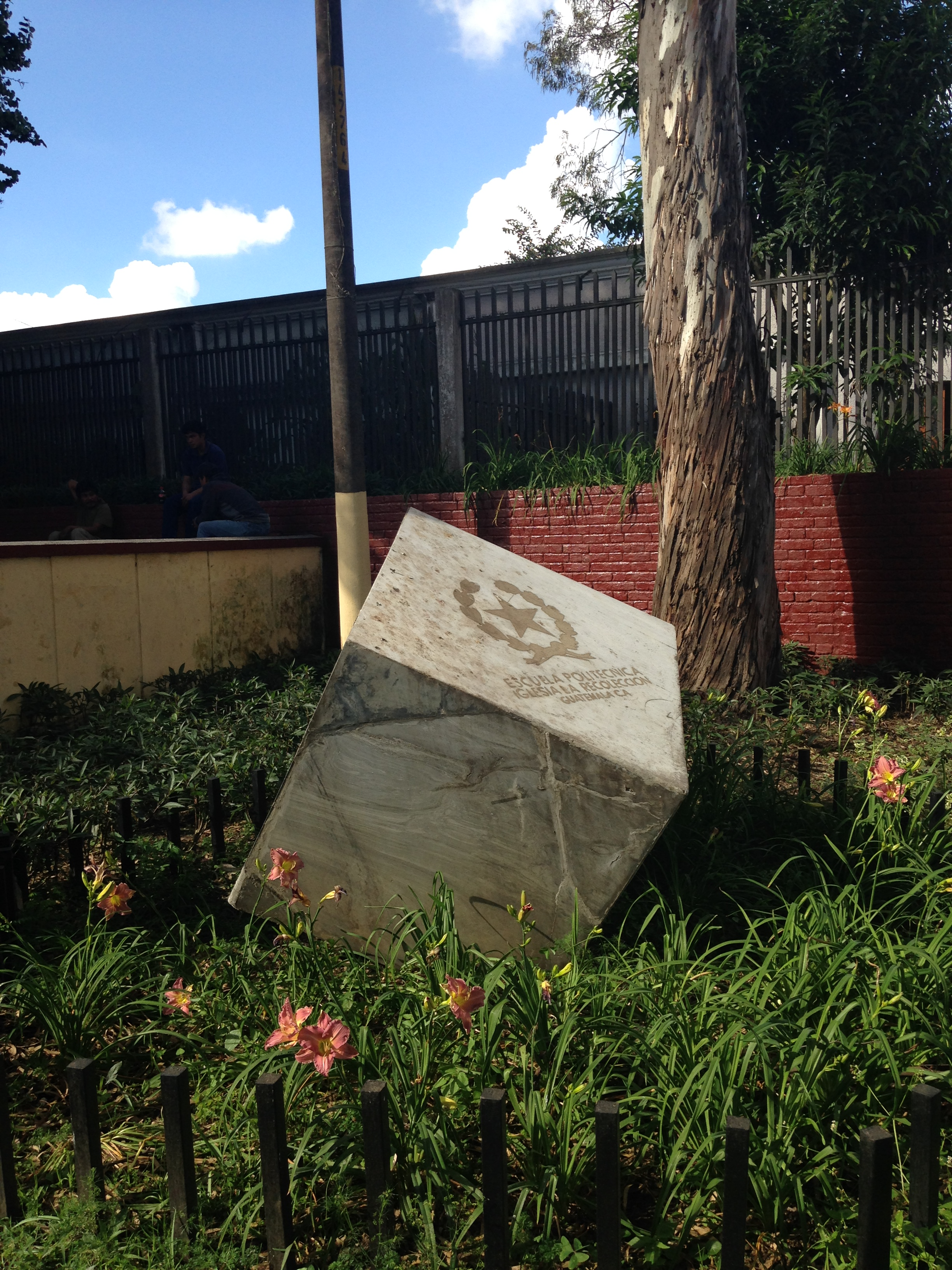 Monumento a la Escuela Politécnica que estuviera en el antiguo convento de La Recolección y que fie mandada a derribar por el presidente Manuel Estrada Cabrera tras un atentado en su contra en abril de 1908. Atrio de la Parroquia del Santísimo nombre de Jesús, templo de la Recolección. Ciudad de Guatemala, 2016